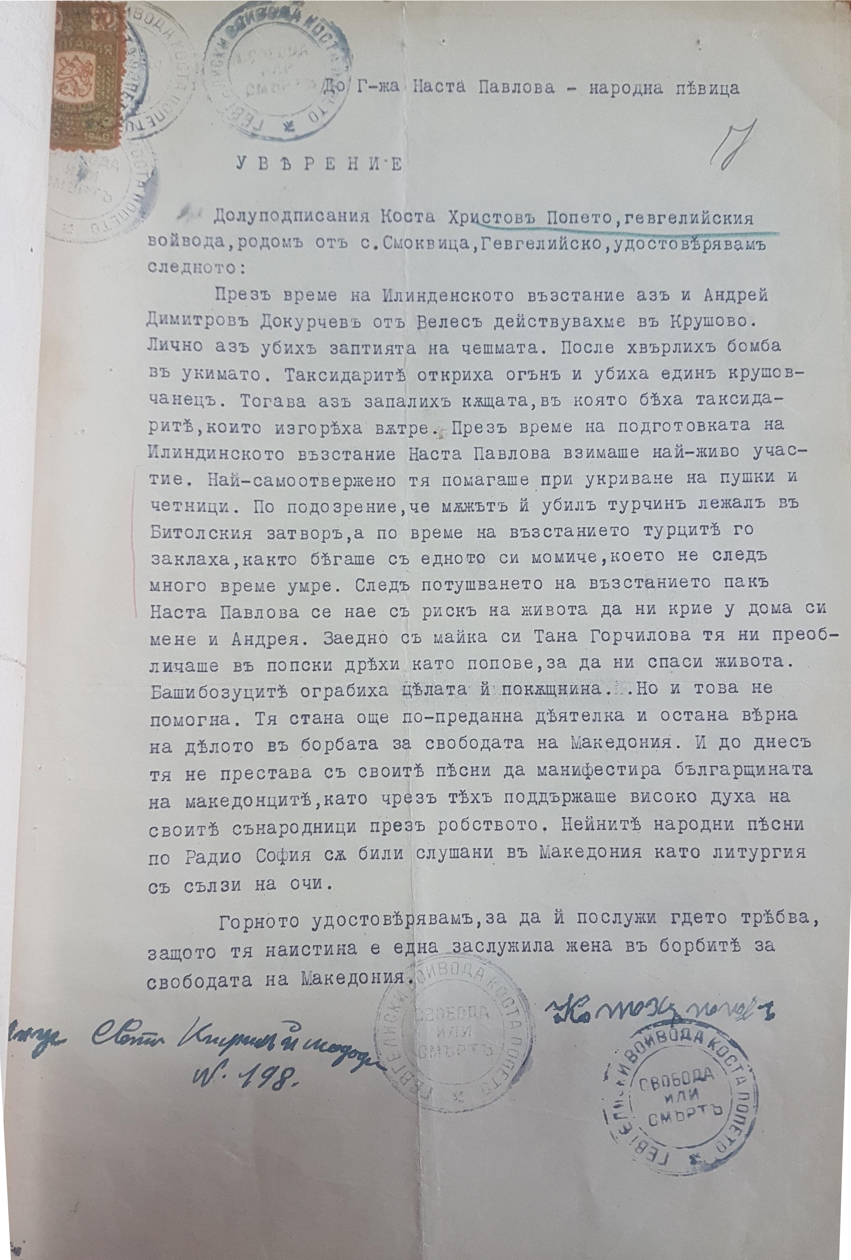 Уверение, подписано от Коста Попето, удостоверяващо, че народната певица Наста Павлова е вземала активно участие в Илинденско-Преображенското въстание